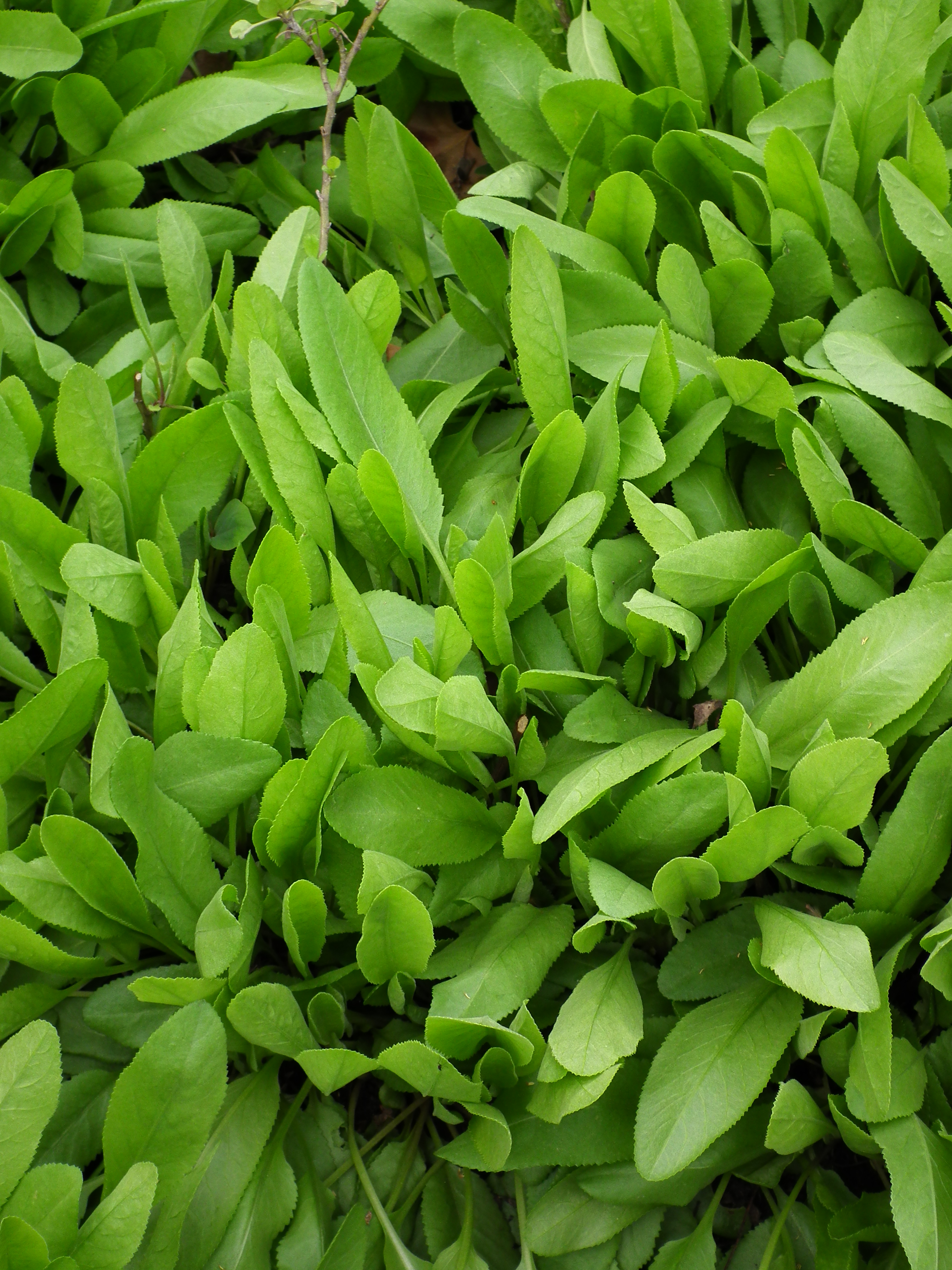 Frauenminze oder Marienblatt (Tanacetum balsamita), fotografiert in Südhessen (Deutschland)